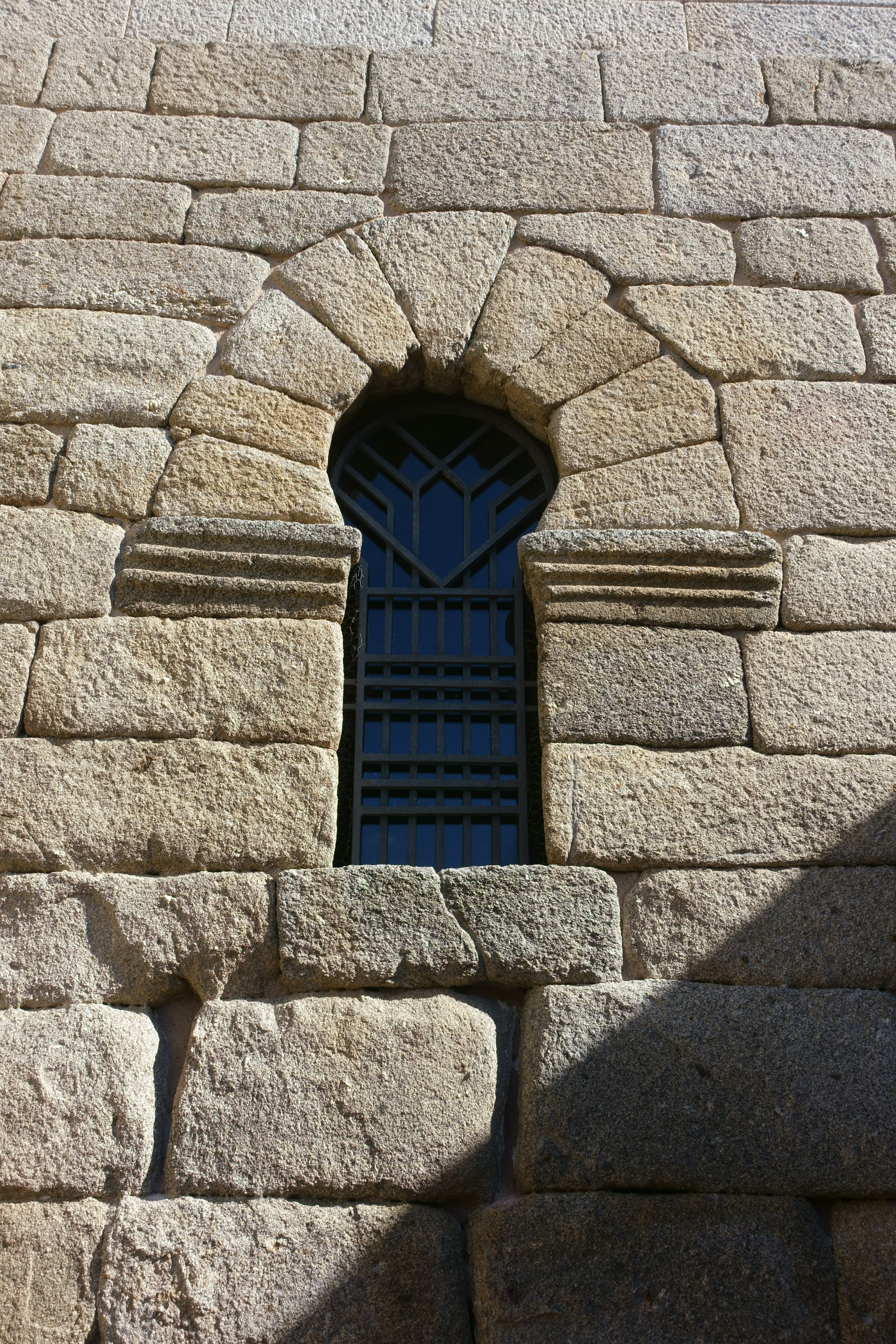 Exterior de la iglesia de Santa María de Melque, en San Martín de Montalbán (Toledo, España).